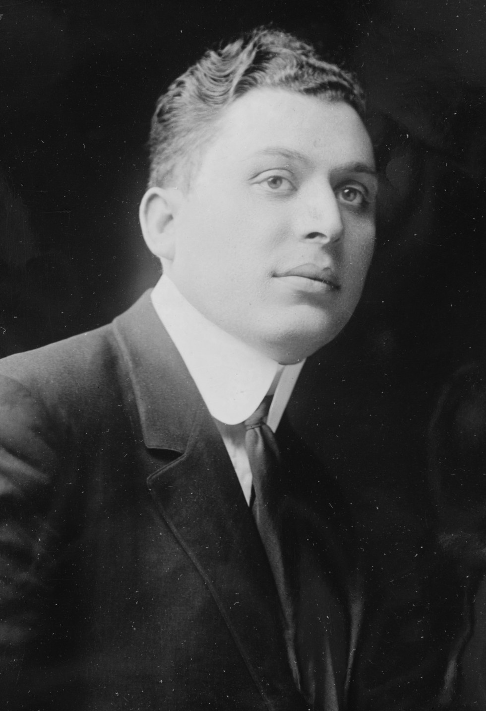 Morris Gest